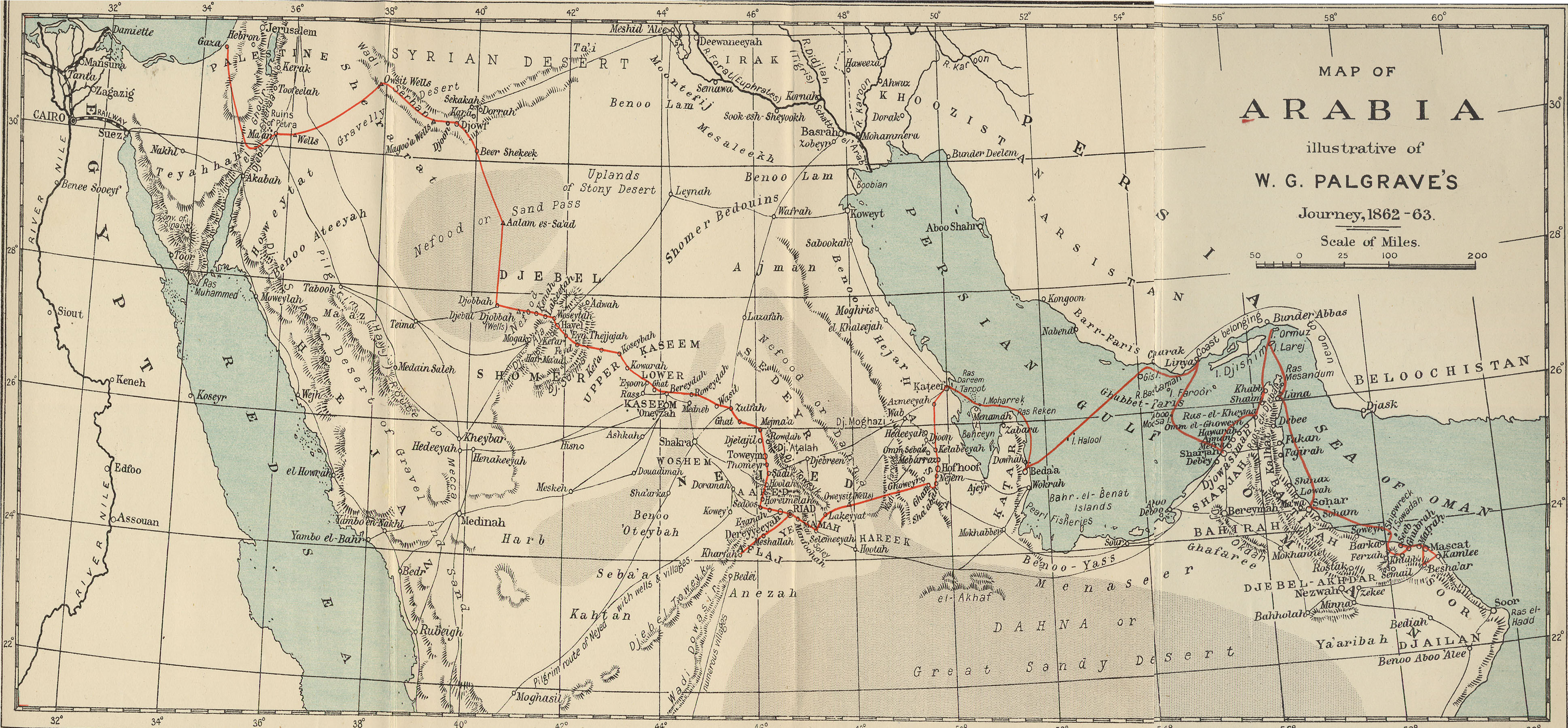 Carte retraçant l'itinéraire de Palgrave en Arabie, tirée de son ouvrage datant de 1908 "Arabie centrale et orientale", publié chez Macmillan and Co., Londres